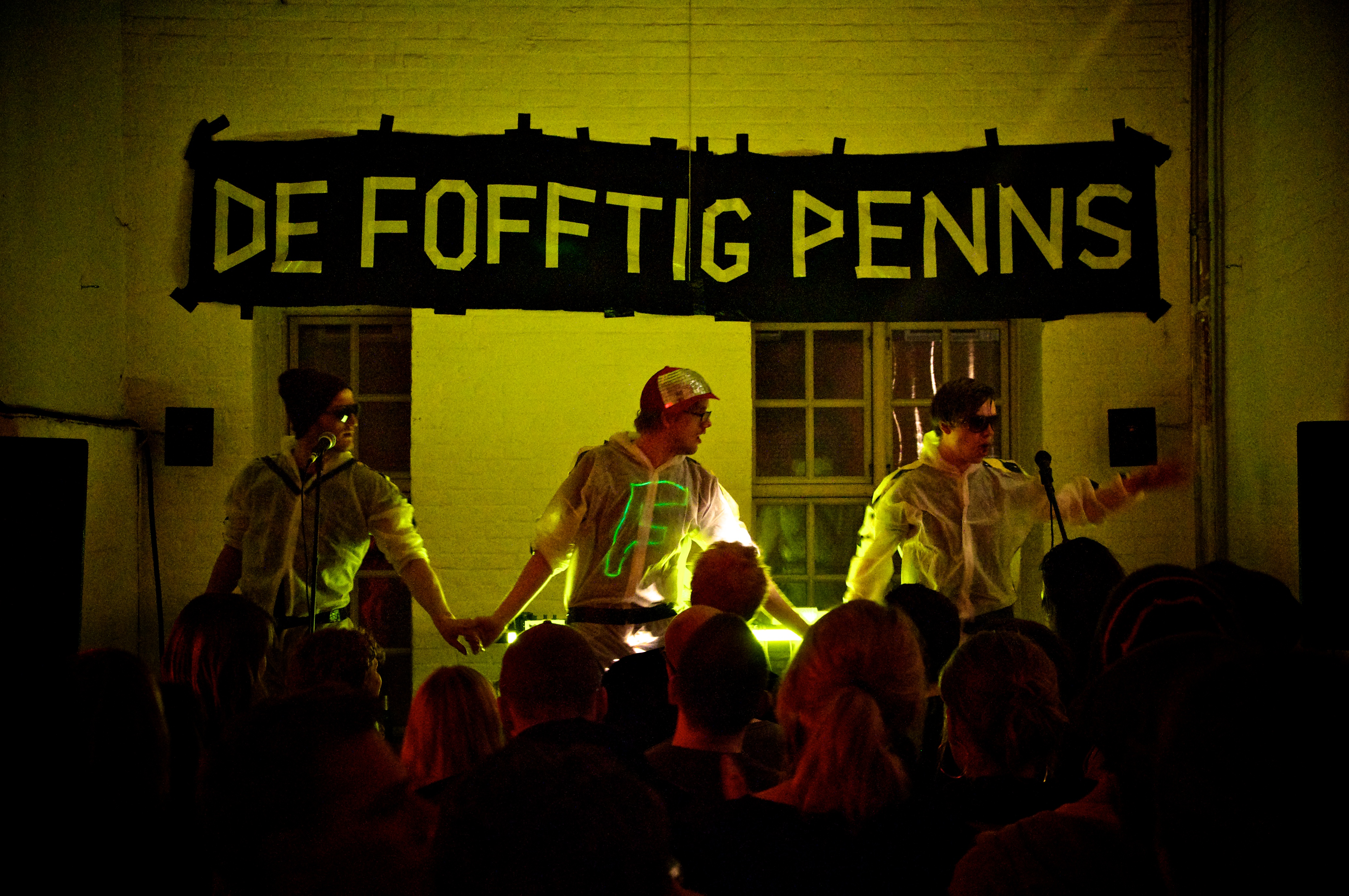 De fofftig Penns live in't Hamborger Westwerk, Aprilmaand 2010